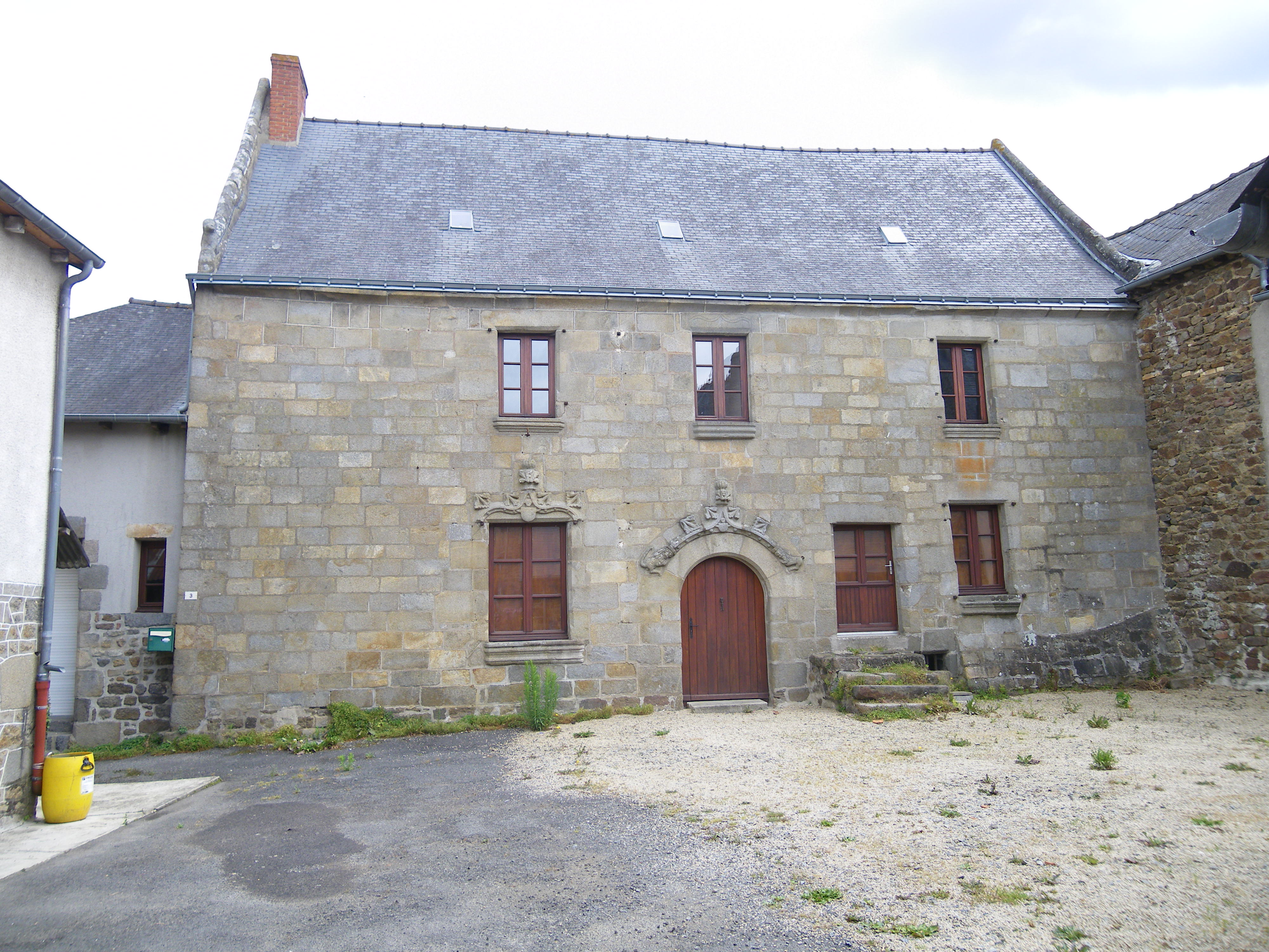 maison ancienne a tinteniac